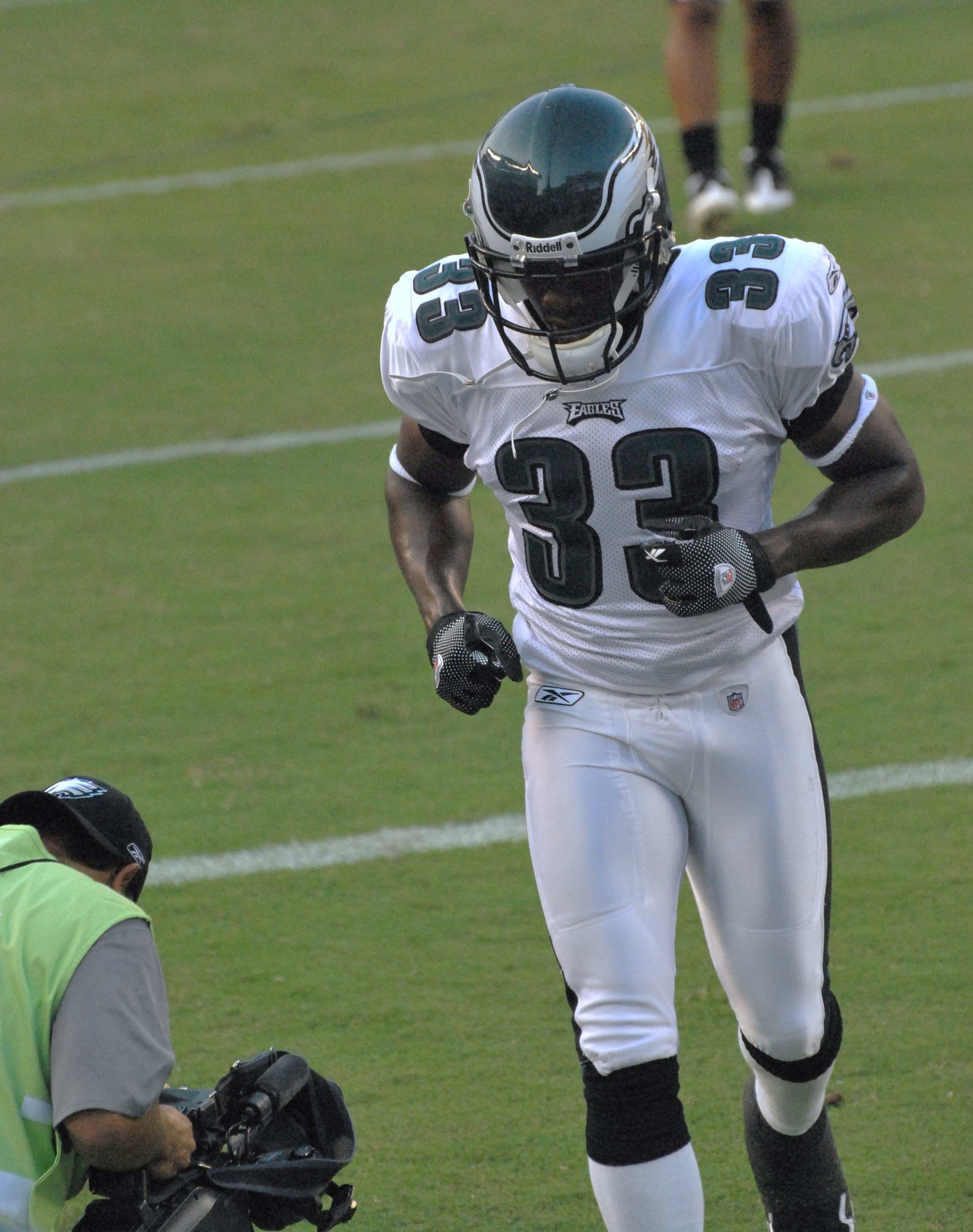 Jack Ikegwuonu in August 2009